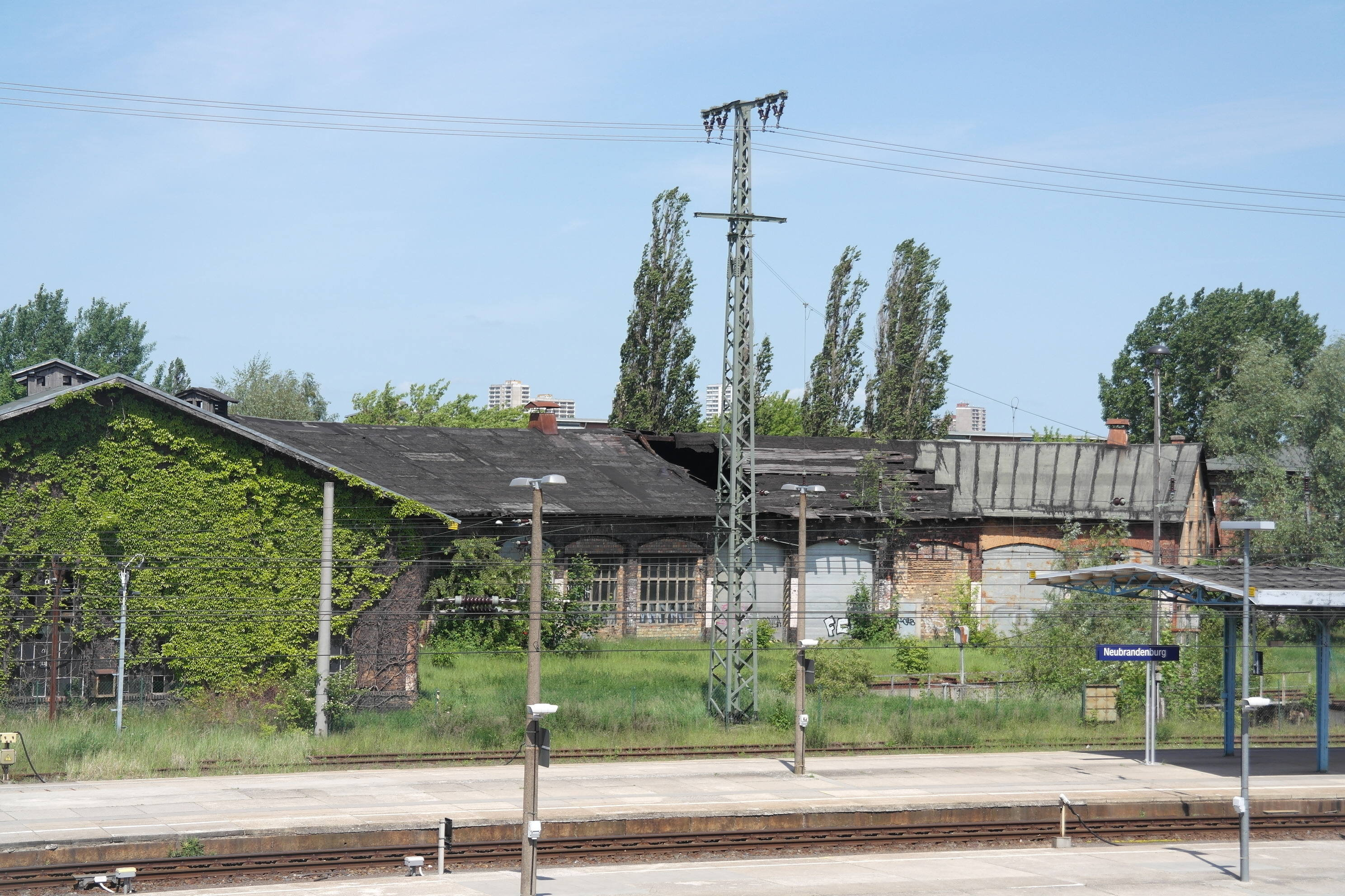 Bahnhof Neubrandenburg, denkmalgeschützter Lokschuppen (der westliche von beiden) im Bahnbetriebswerk